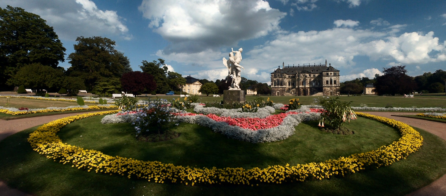 Pietro Balestras Marmorskulptur „Die Zeit raubt die Schönheit“, vor dem Palais im Großen Garten Dresden.